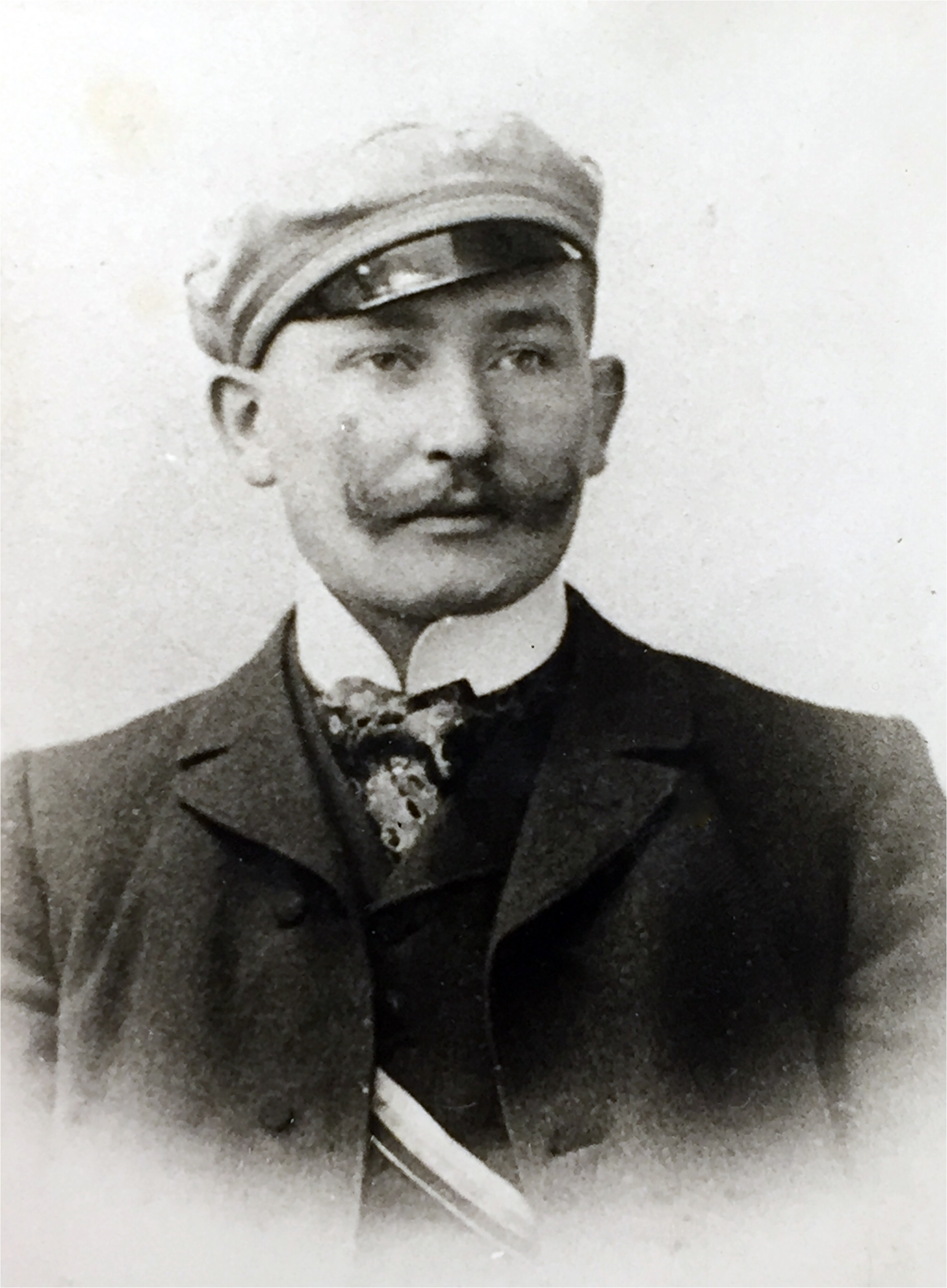 Porträtfotografie von Otto Söffing als Student in Leipzig